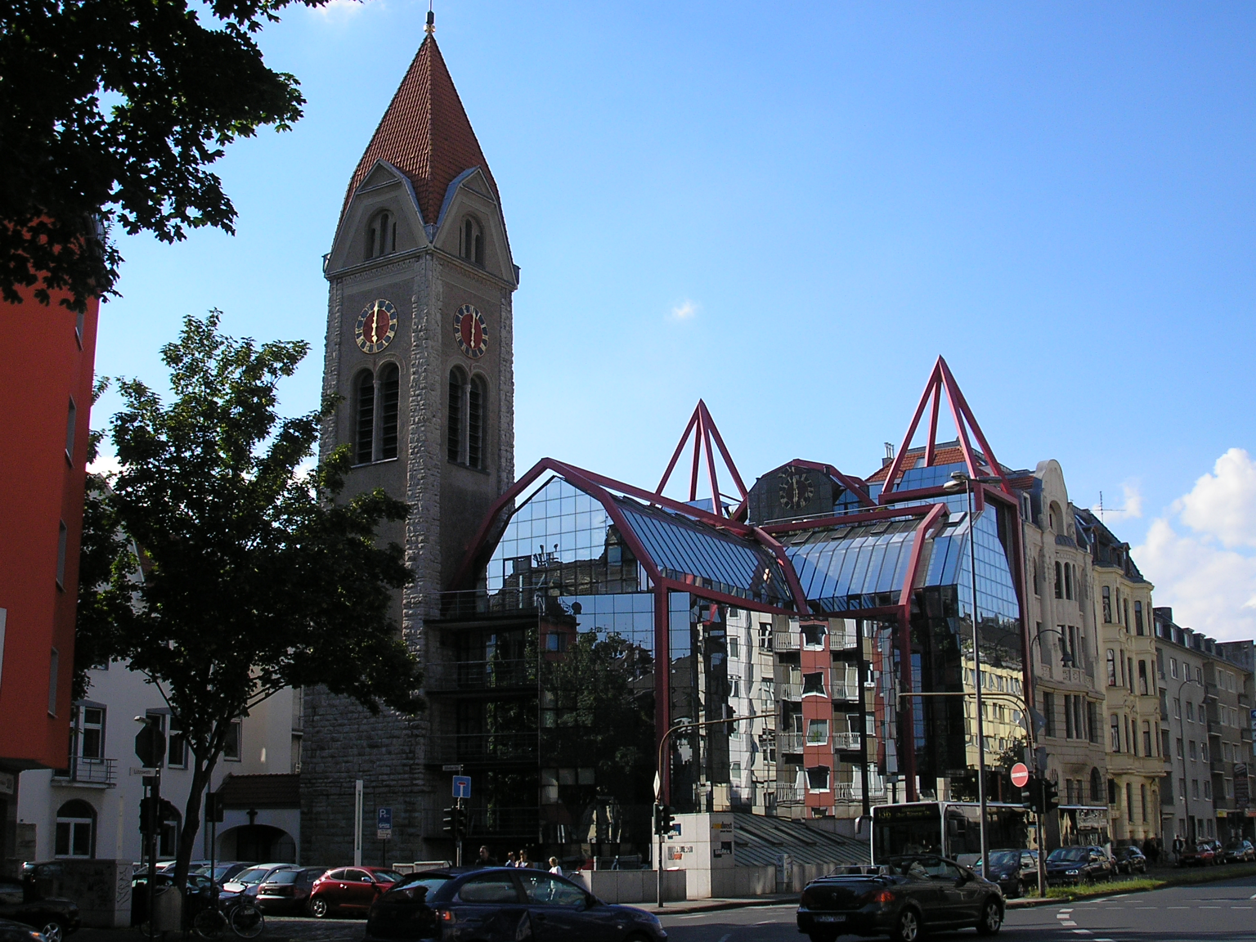 Alt-Katholische Gemeinde Christi Auferstehung in Köln. Teile des Gotteshauses wurden in Büros umgewandelt.